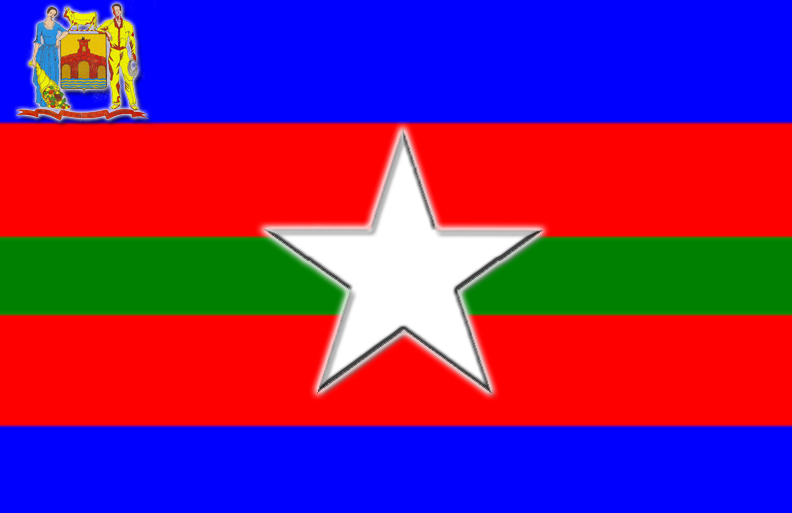 Bandera del Municipio Alberto Adriani